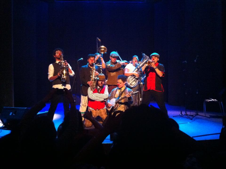 Presentación en Radio UNAM De Triciclo Circus Band